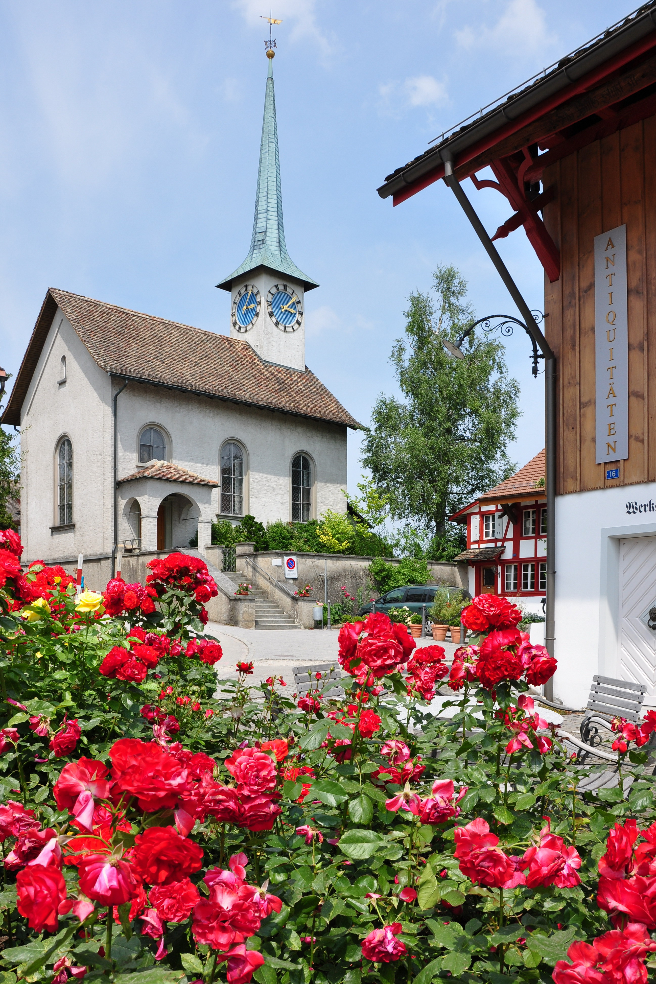 Reformierte Kirche in Seegräben (Switzerland)